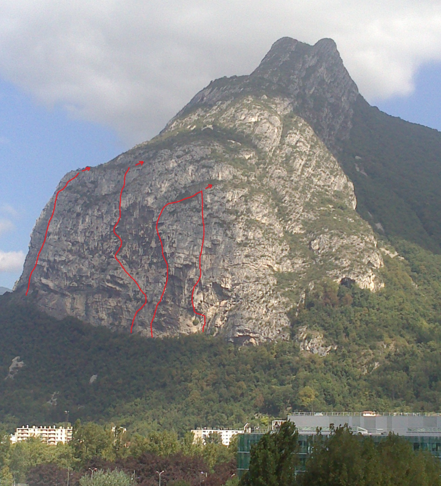 Néron : versant sud depuis le Polygône scientique de Grenoble, tracé des topos d'escalade